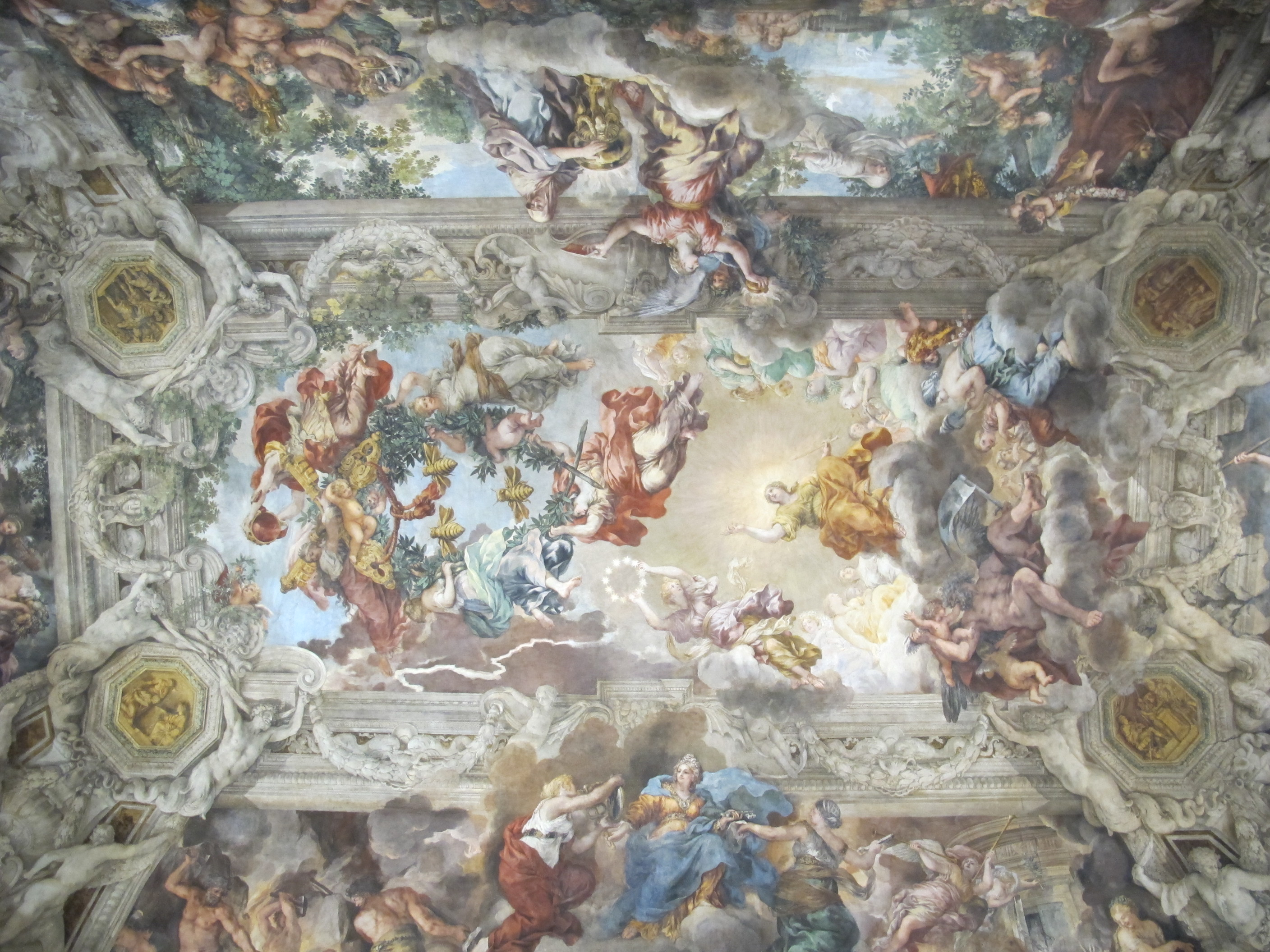 Palazzo barberini, salone di pietro da cortona